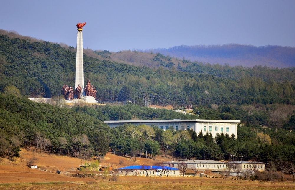 巡道工出品 photo by Xundaogong——朝鲜王在山革命事迹纪念馆